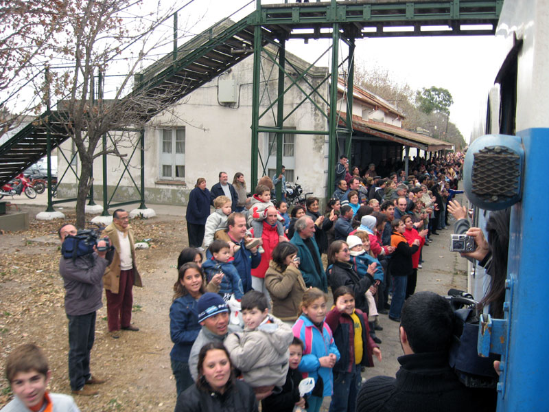 Estación Laboulaye